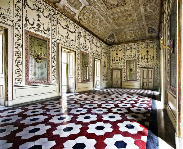 Salone del piano nobile del palazzo Riario Sforza di Napoli